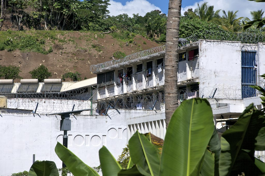 Le centre pénitentiaire de Faa'a Nuutania, ouvert en 1970 se situe à environ 5 km de la ville de Papeete. Il affiche le plus fort taux d'occupation de France : 414% (253 détenus pour 61 places au centre de détention, et 182 pour 110 places en maison d'arrêt). C'est aussi sûrement la plus vétuste.